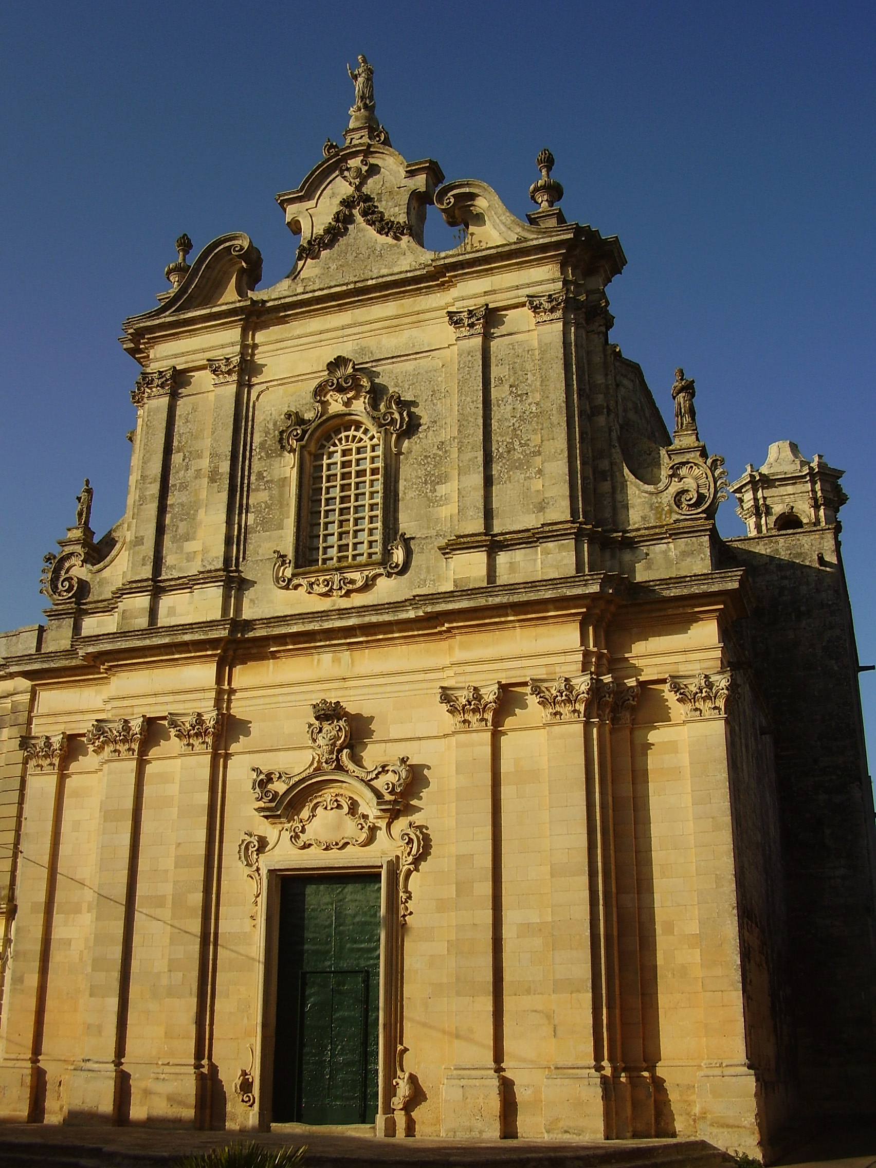 Chiesa degli Agostiniani di Scorrano, Lecce